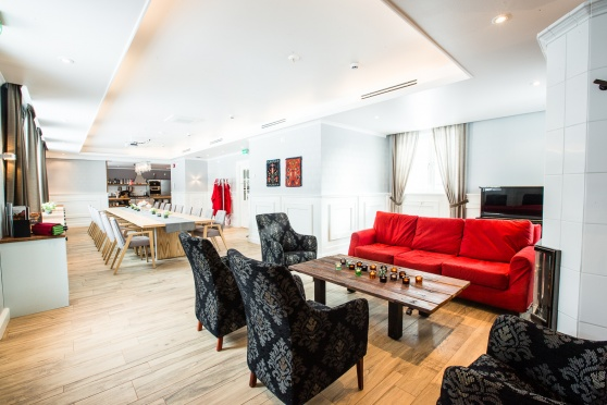 Krapi Ali-Tupa